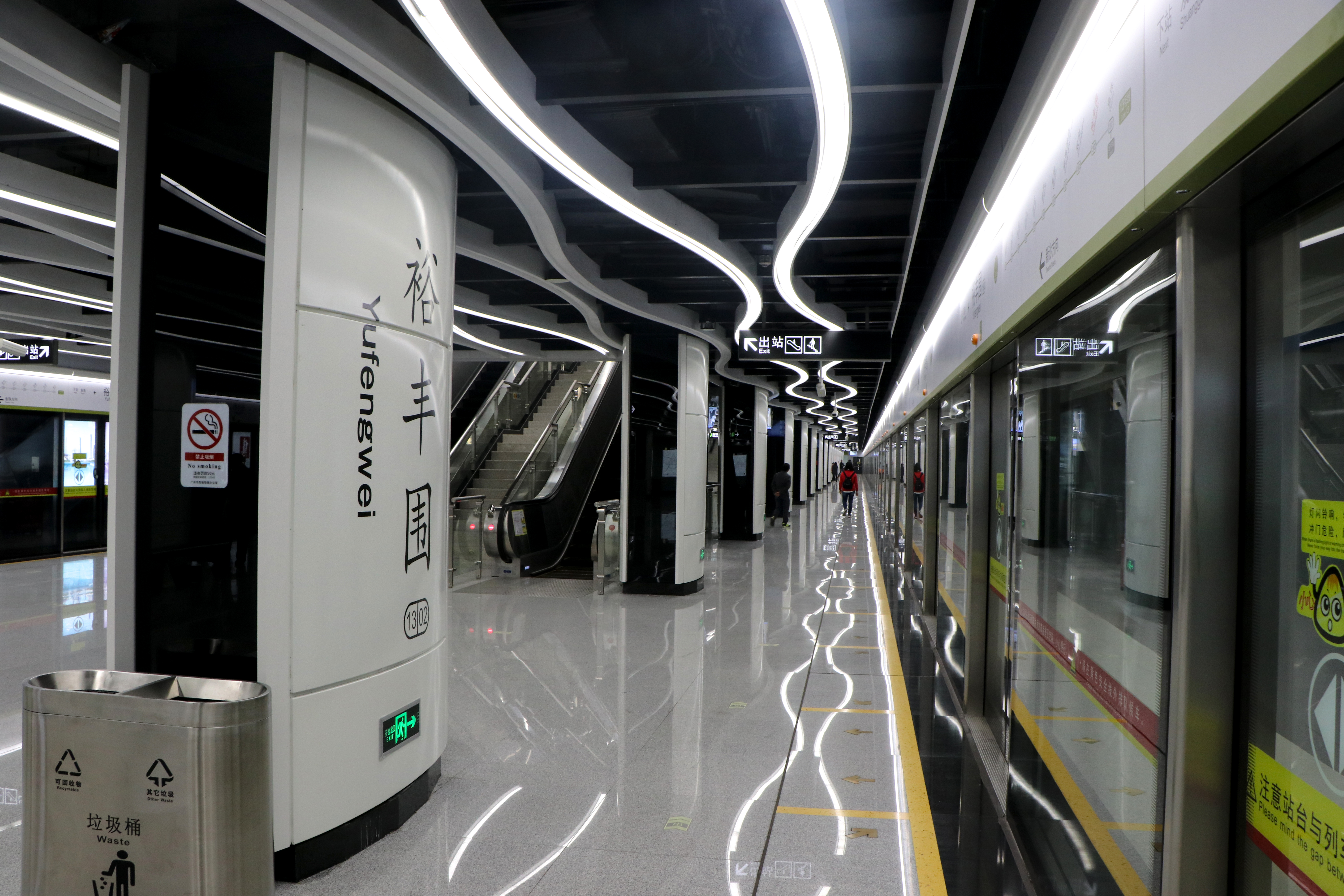 广州地铁裕丰围站